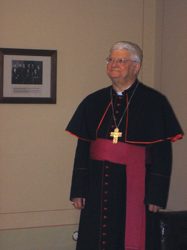 Telšių vyskupas Jonas Boruta SJ